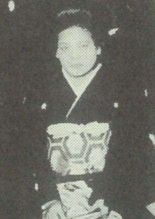 Saiki Toshiko (佐伯敏子 (Japanese, *1919, †2017)